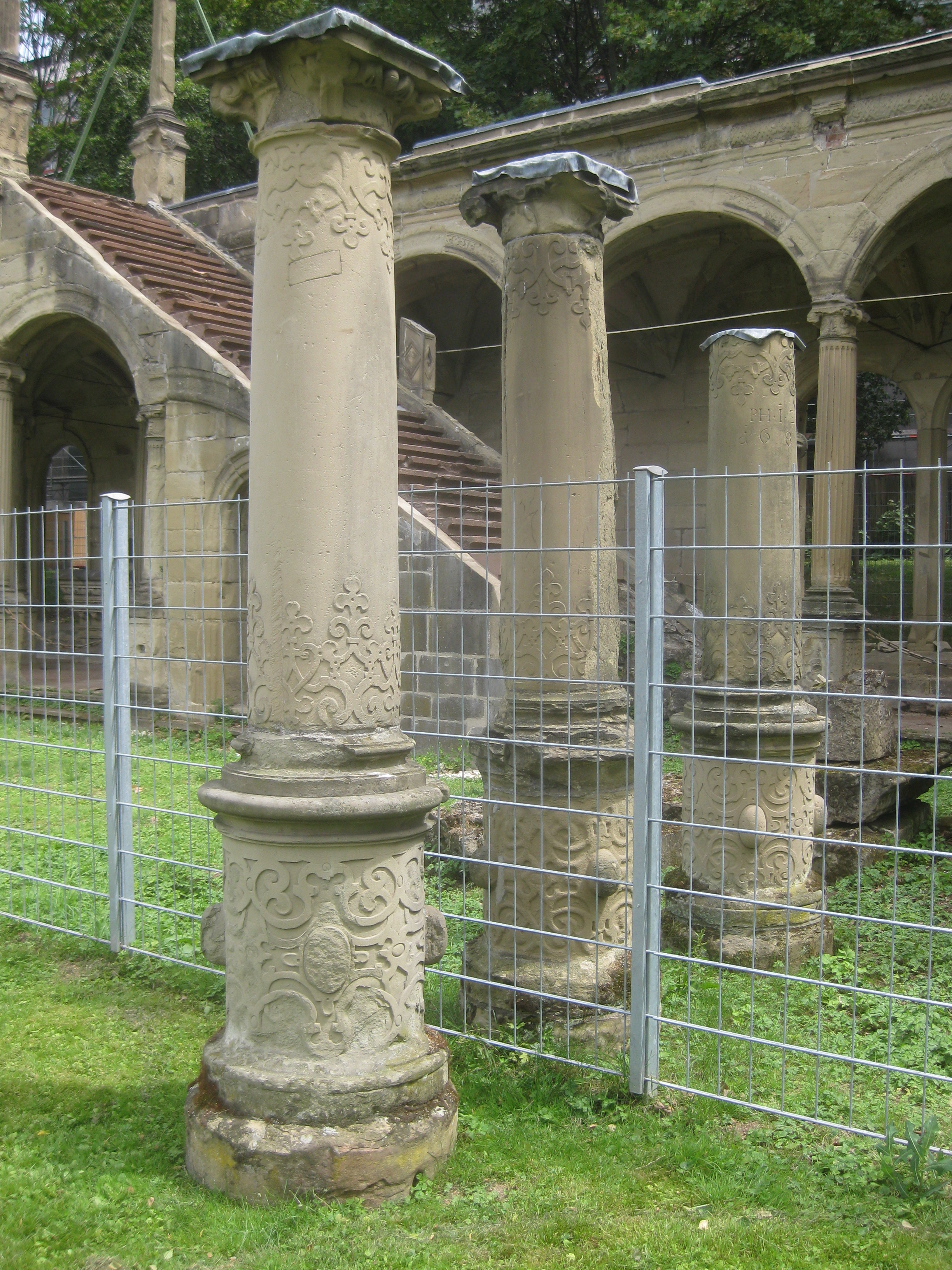 Drei von vier Säulen vom ehemaligen Neuen Lusthaus in Stuttgart, die Friedrich Wilhelm Hackländers 1846 beim Abbruch des Handelshauses des Indigo-Müller entdeckte und in seine Villa Villa Heidehaus als Altanstützen einbauen ließ. Nach dem Abriss der Villa 1910 wurden die Säulen bei der Ruine des Neuen Lusthauses im Mittleren Schlossgarten aufgestellt. Die drei anderen Säulen stehen unweit entfernt an anderer Stelle vor der Lusthausruine. Eine der Säulen trägt die Inschrift: „PH • I • Z • / 1 6 8 0“. Die vierte Säule steht unweit entfernt an anderer Stelle vor der Lusthausruine.